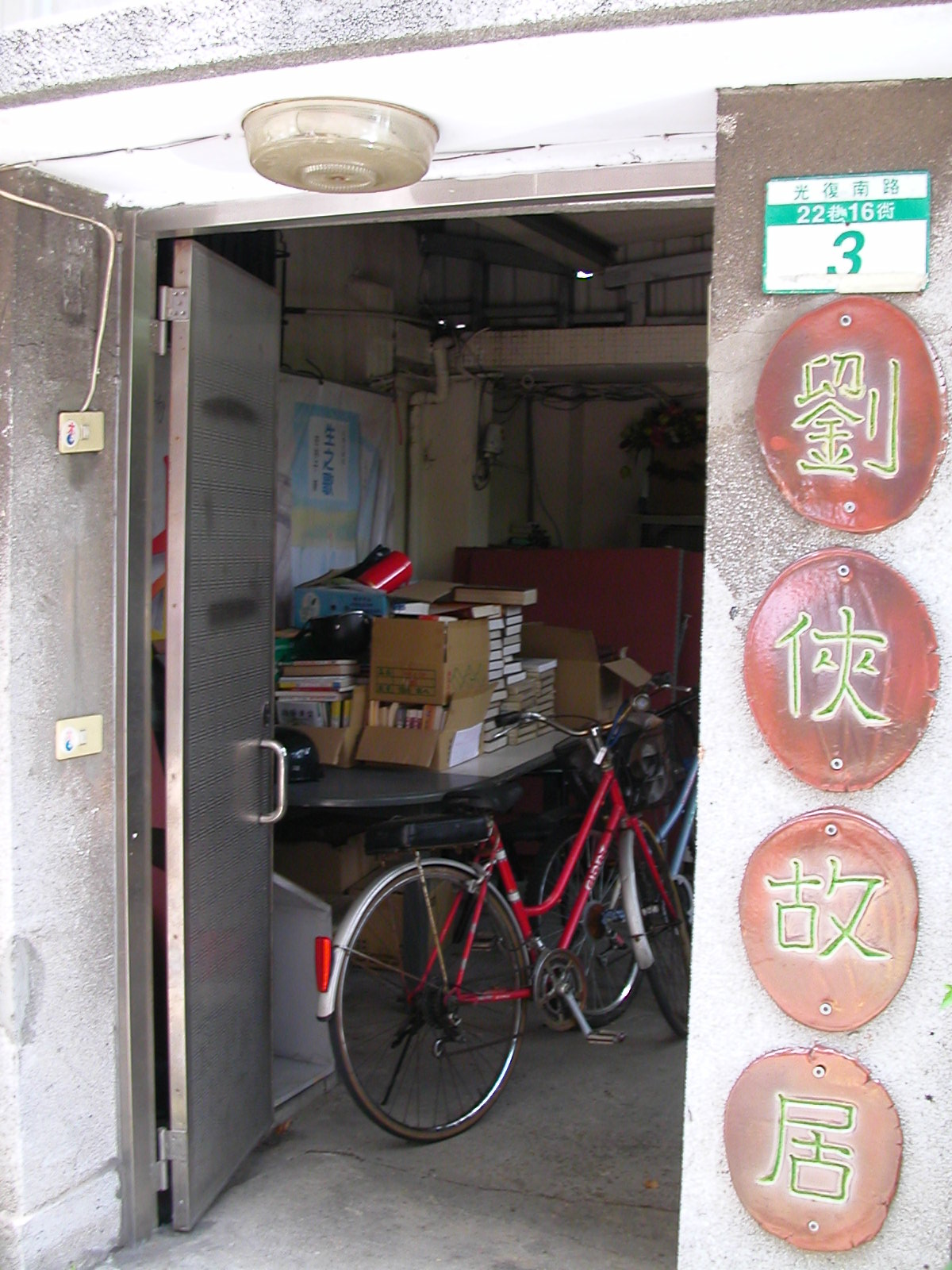 台北市松山區光復南路22巷16弄3號，作家劉俠之故居，現為中華民國劉俠之友會會址。Hingsang攝於2005年8月3日。